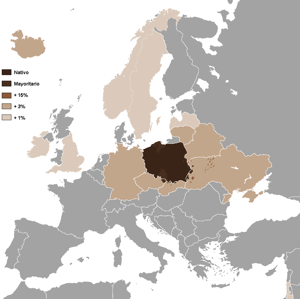 Polish language in Europe